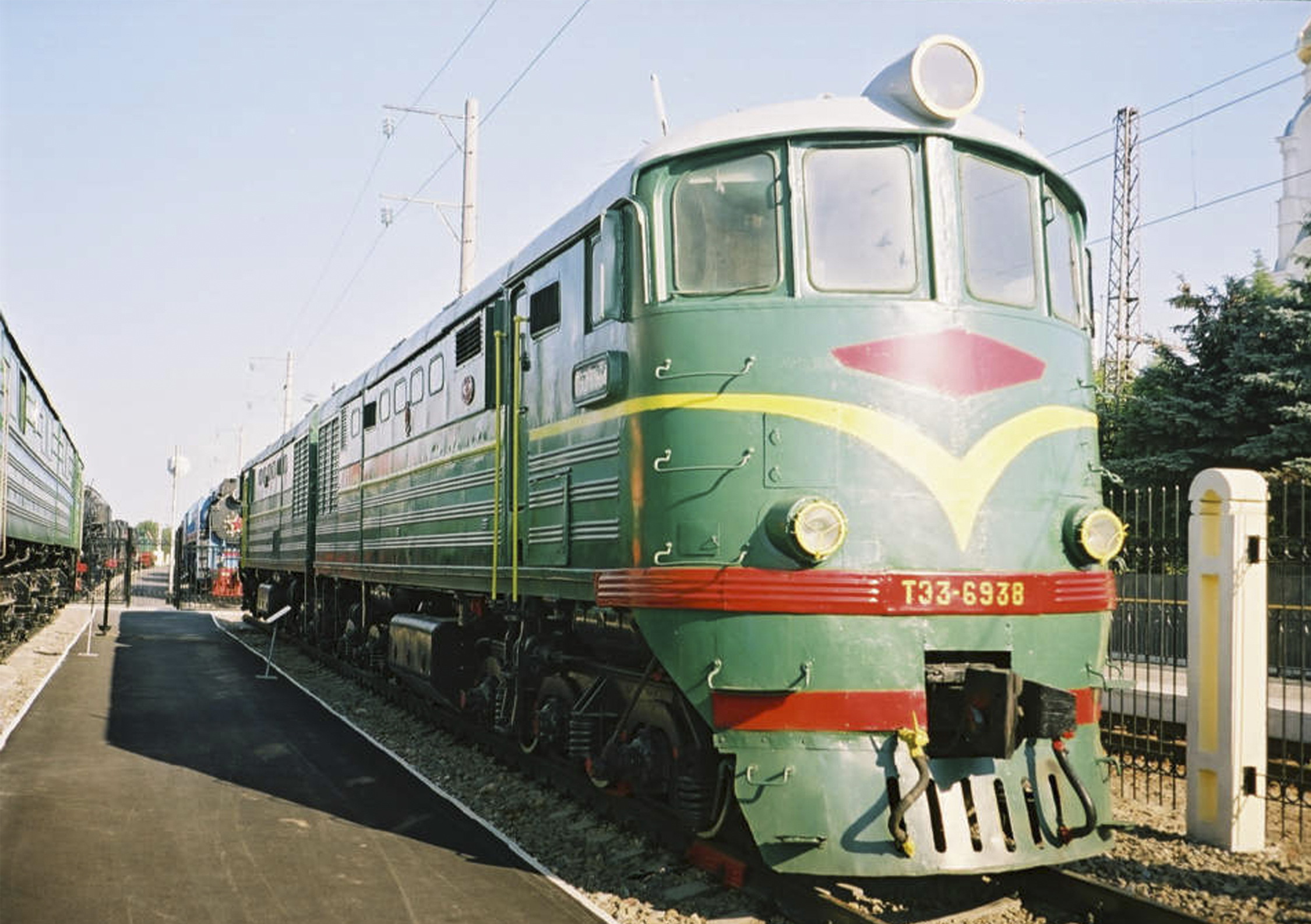 Тепловоз построен в 1968 году Луганским тепловозостроительным заводом